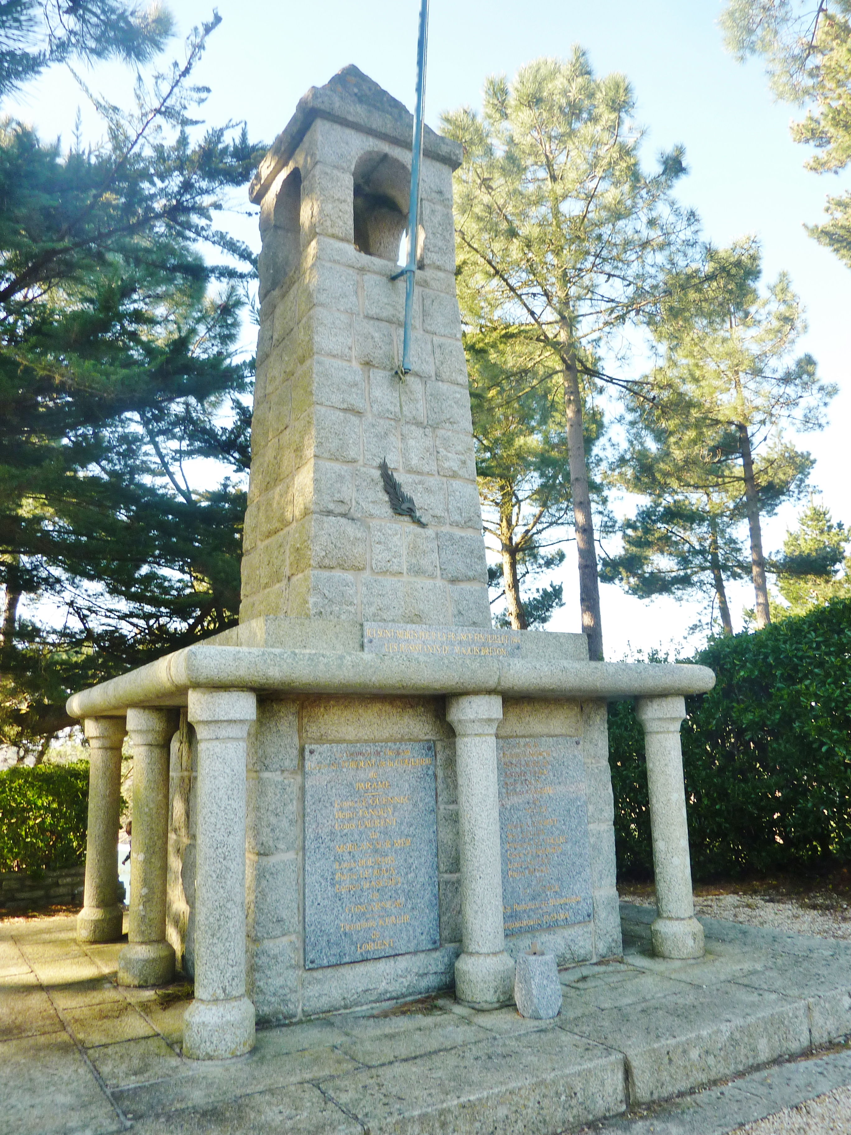 Kerfany-les-Pins : monument commémoratif des résistants fusillés le 30 juillet 1944